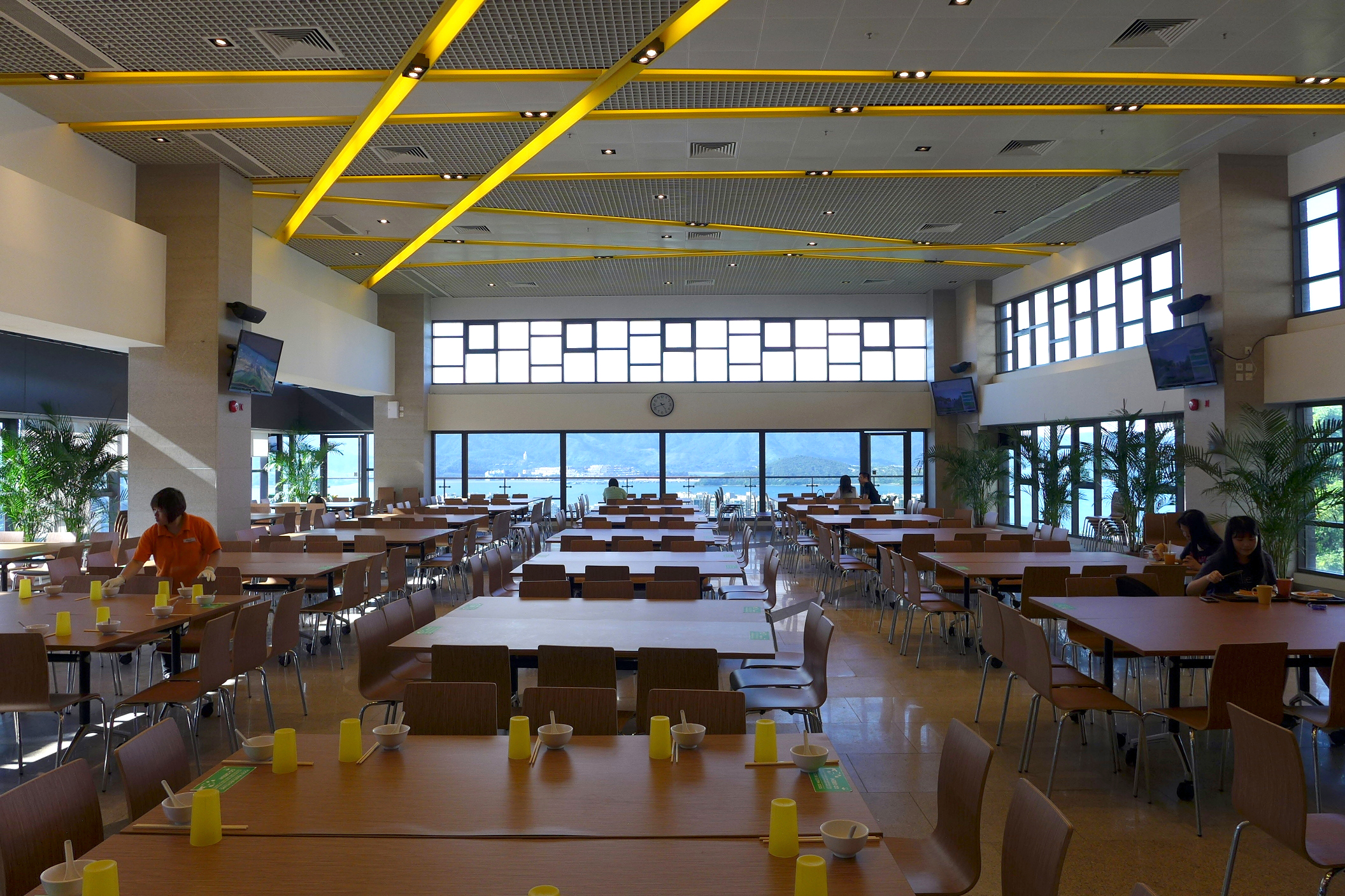 Wu Yee Sun College Canteen